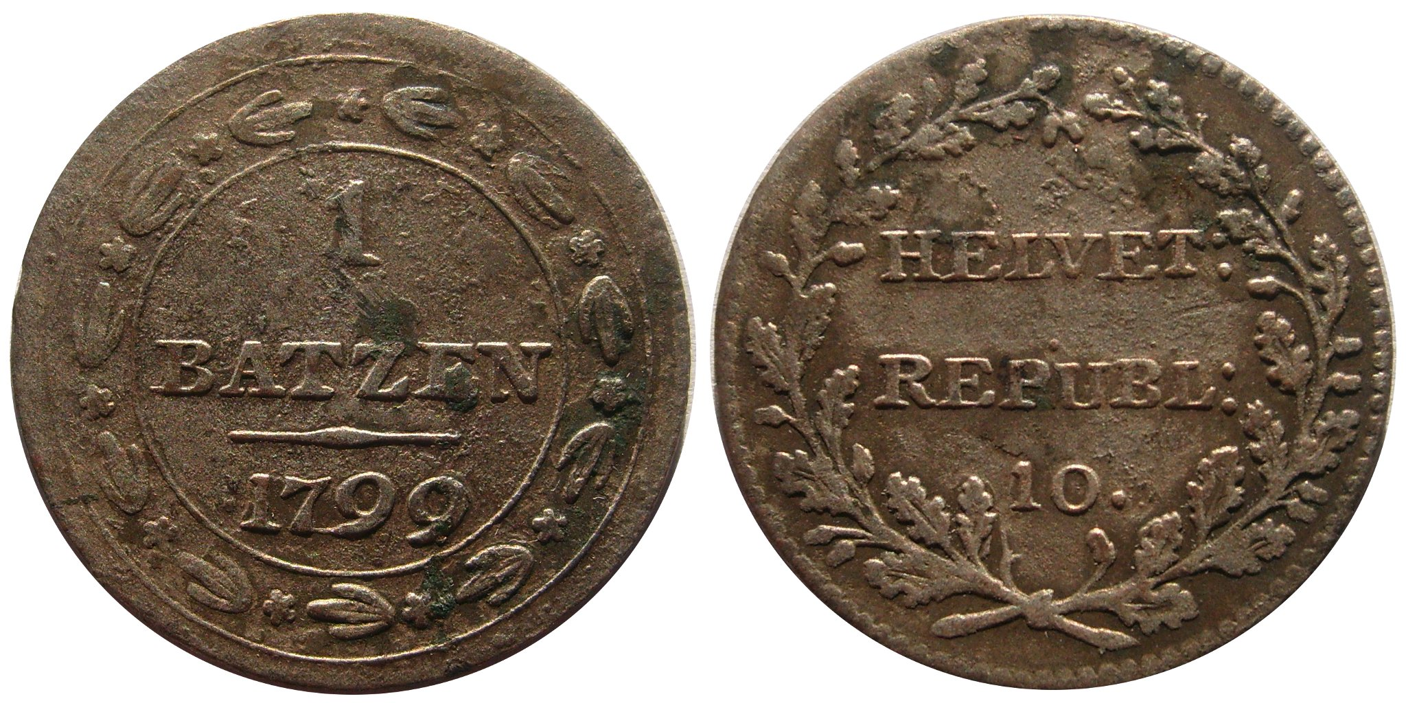 Description 1 batz république helvétique 1799 Date10 April 2009SourceOwn workAuthorJ. Courtois File:1batzrephelv1799.jpg 1 batz république helvétique 1799